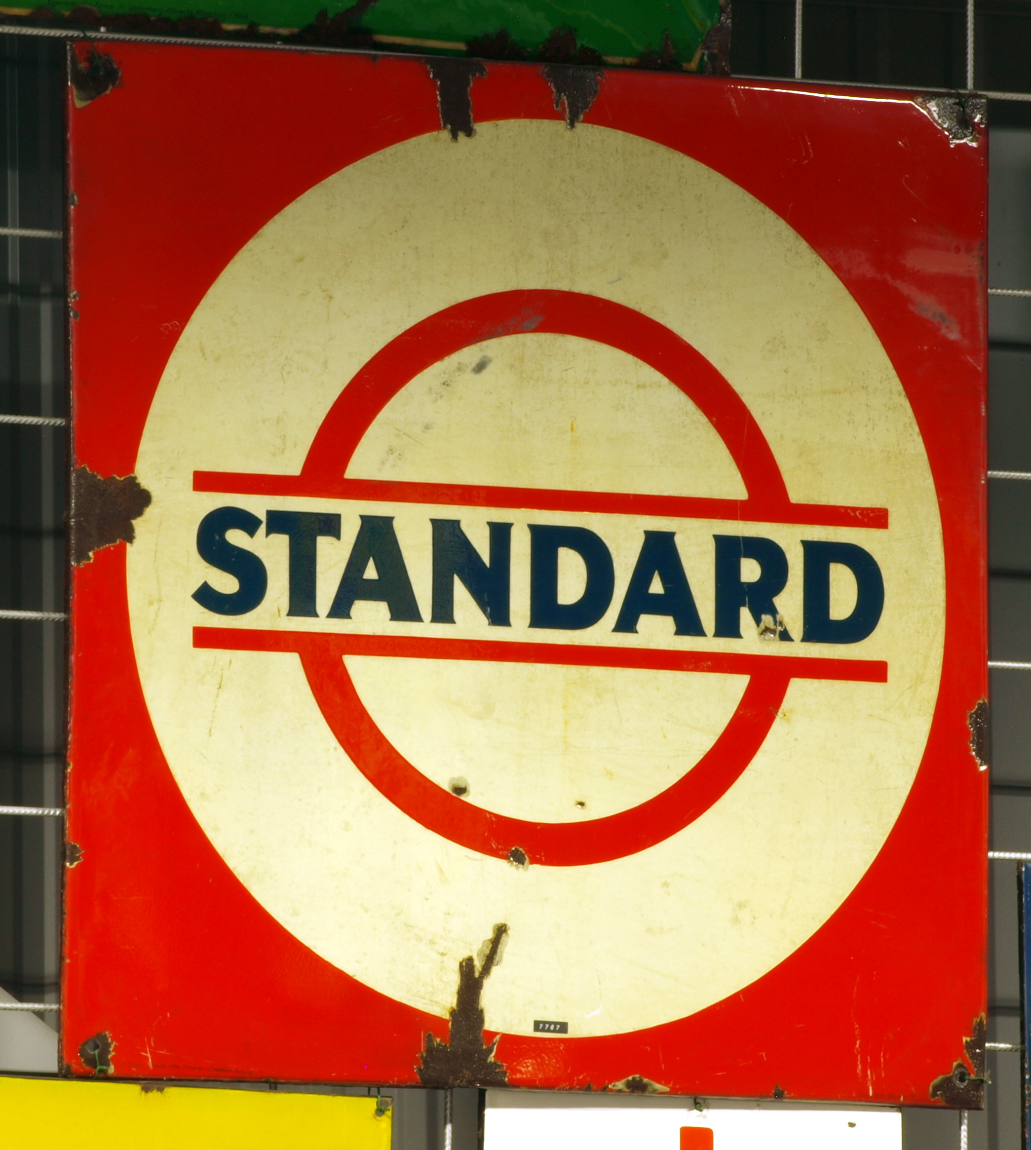 Enamel advertising sign, Standard.